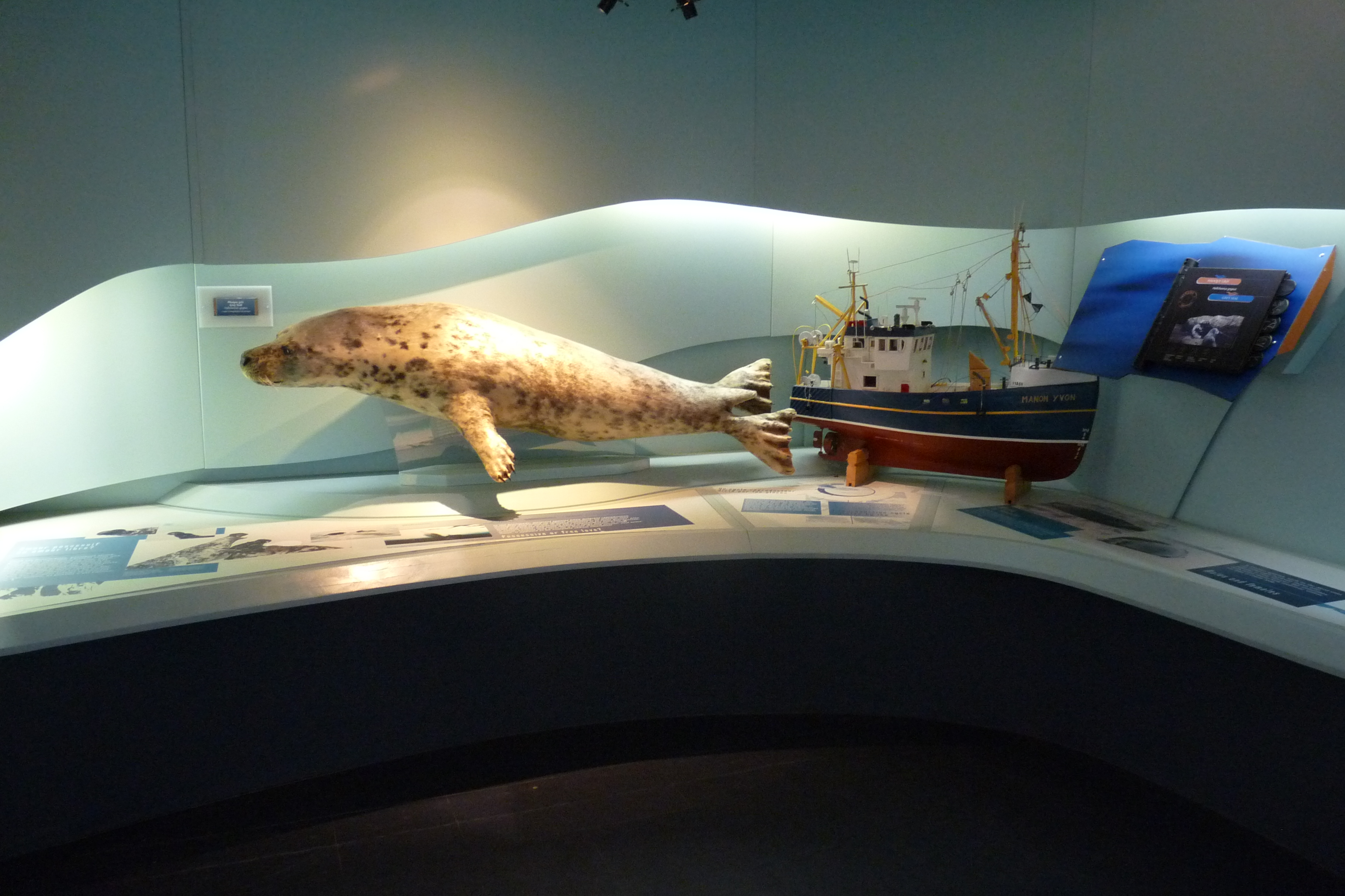 Présentation au centre d'interprétation du phoque